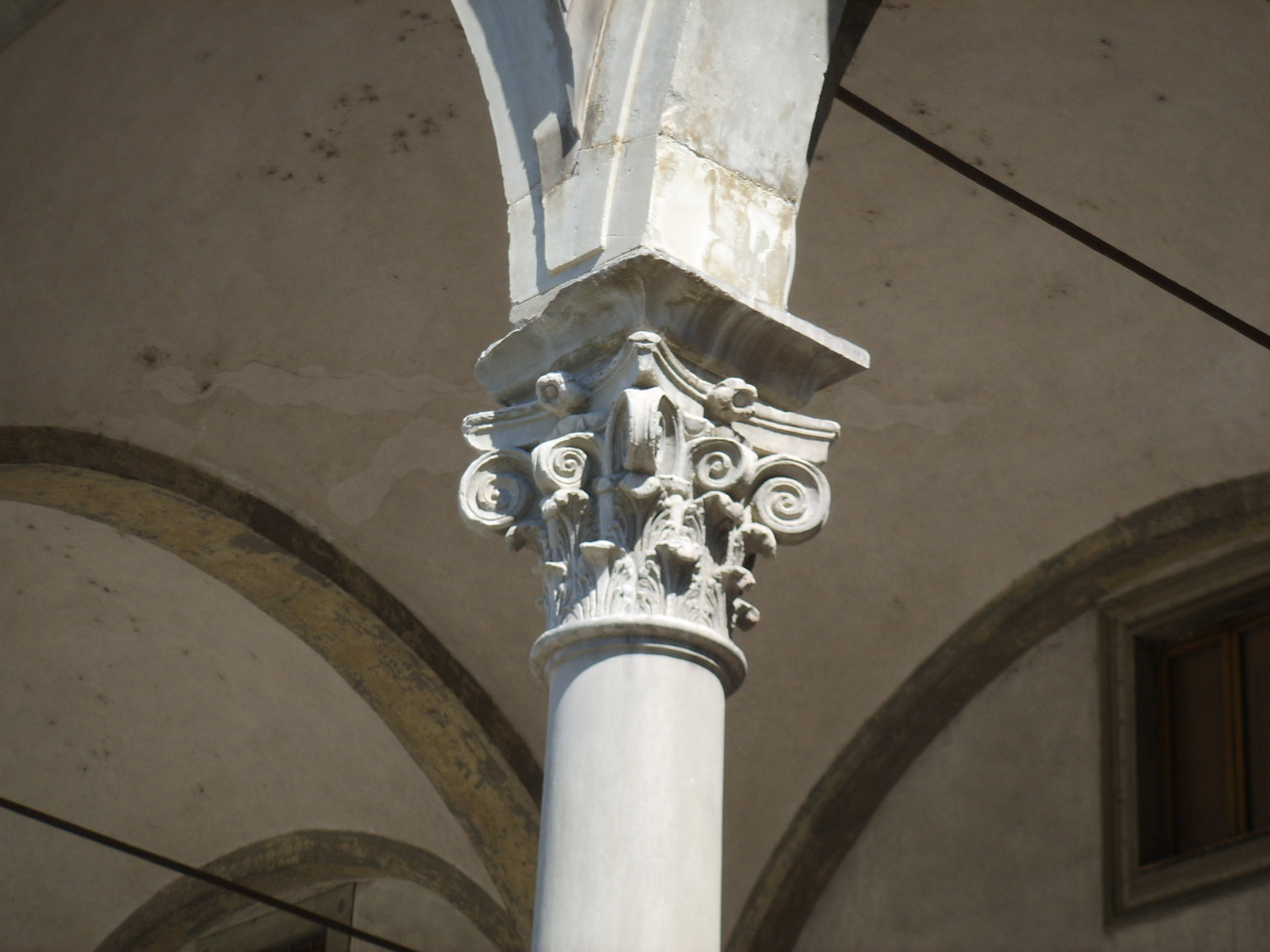 Spedale degli innocenti, capitello